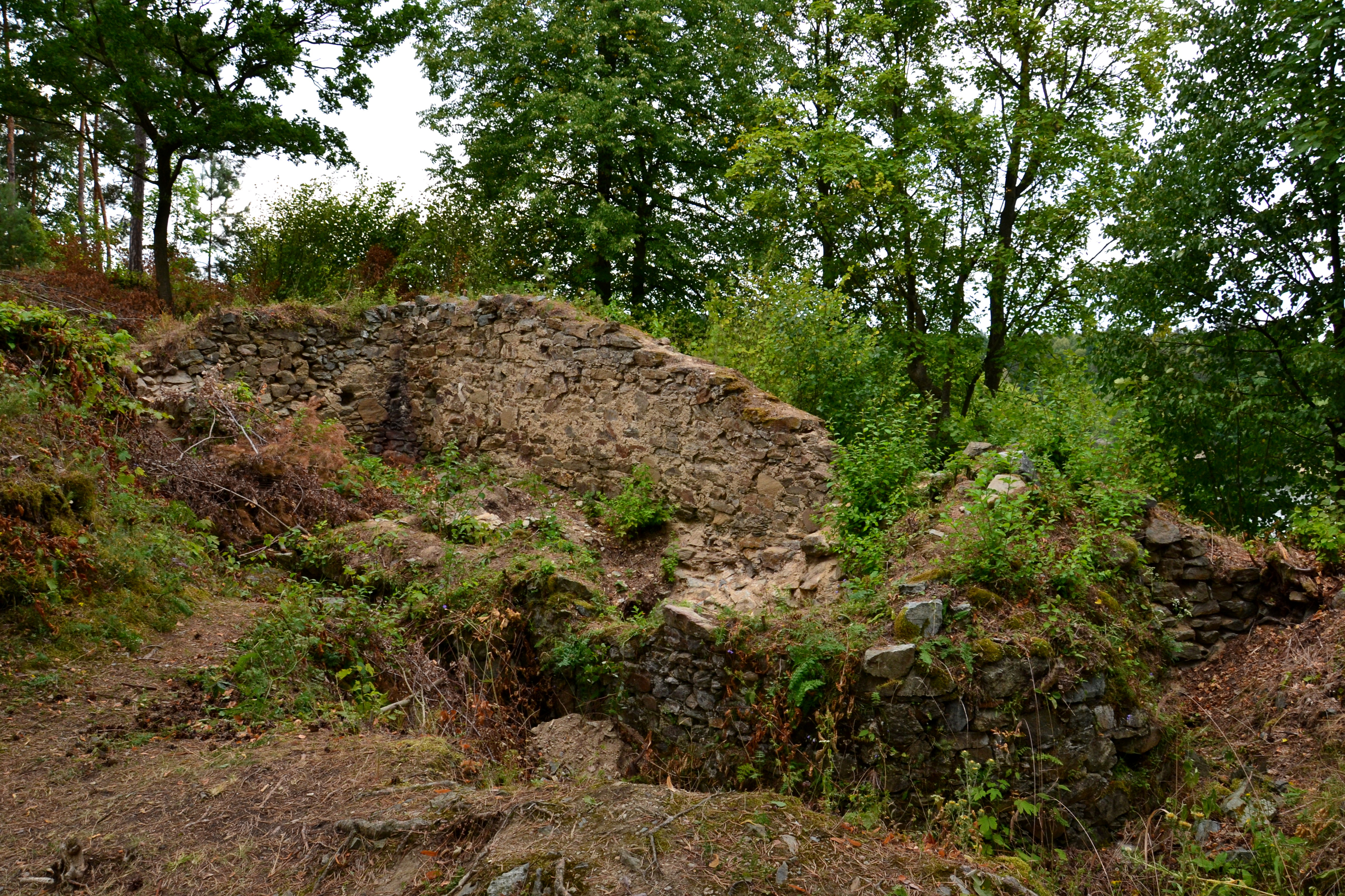 Základy románské kaple